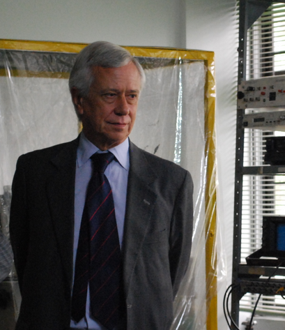 Dr. Eduardo Posada en el laboratorio de Neurofisiología del Centro Internacional de Física